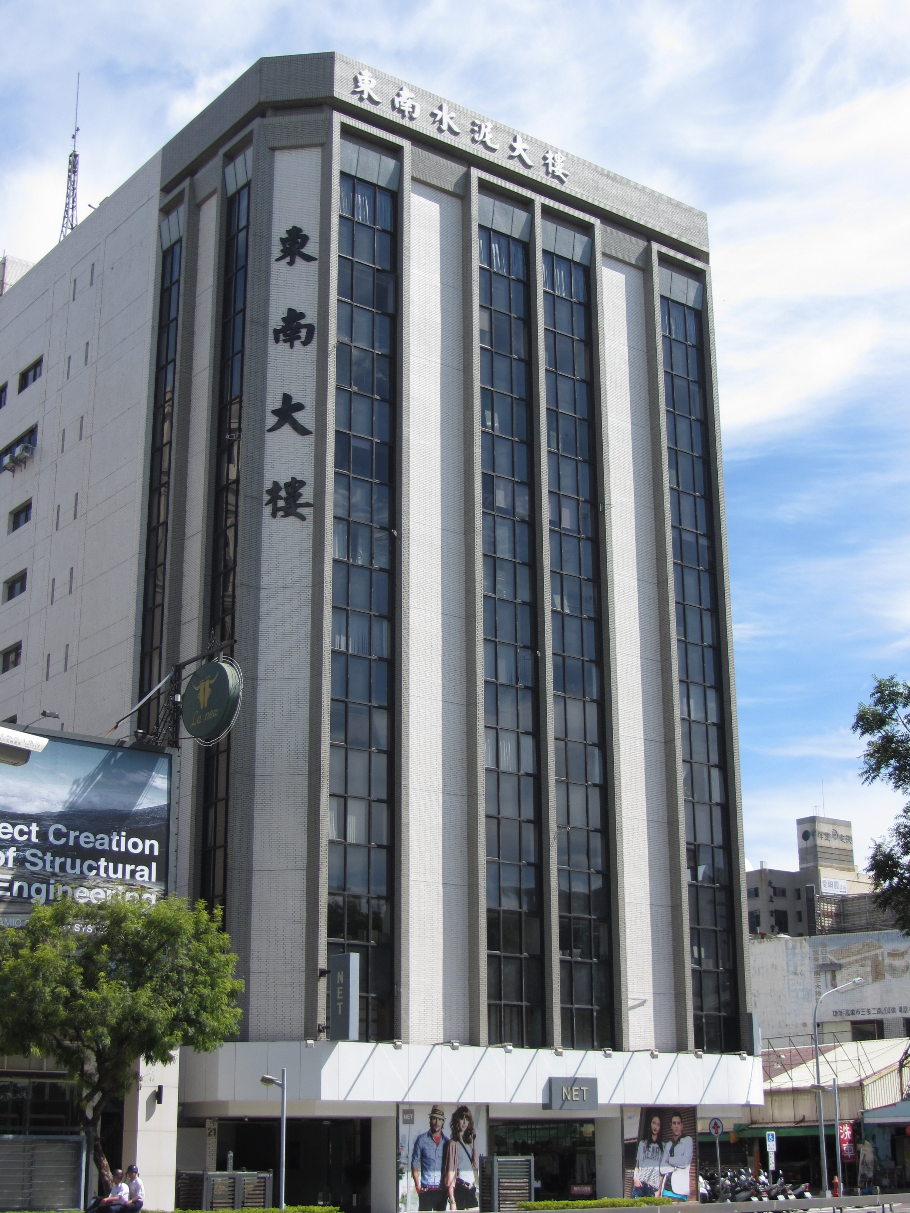 東南水泥大樓，地址：高雄市前金區五福三路21號。